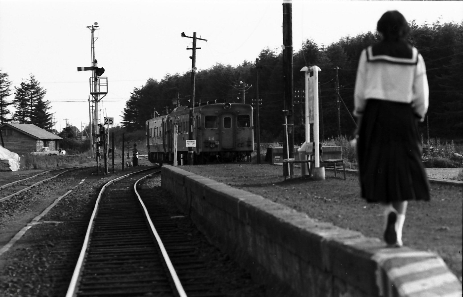 西春別駅ホームの風景 1980年8月